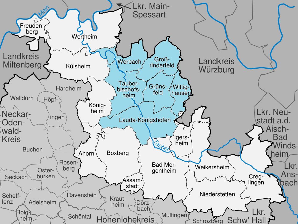 Zweckverband Wasserversorgung Mittlere Tauber Verbandsmitglieder bzw. Verbandsgebiet 2020